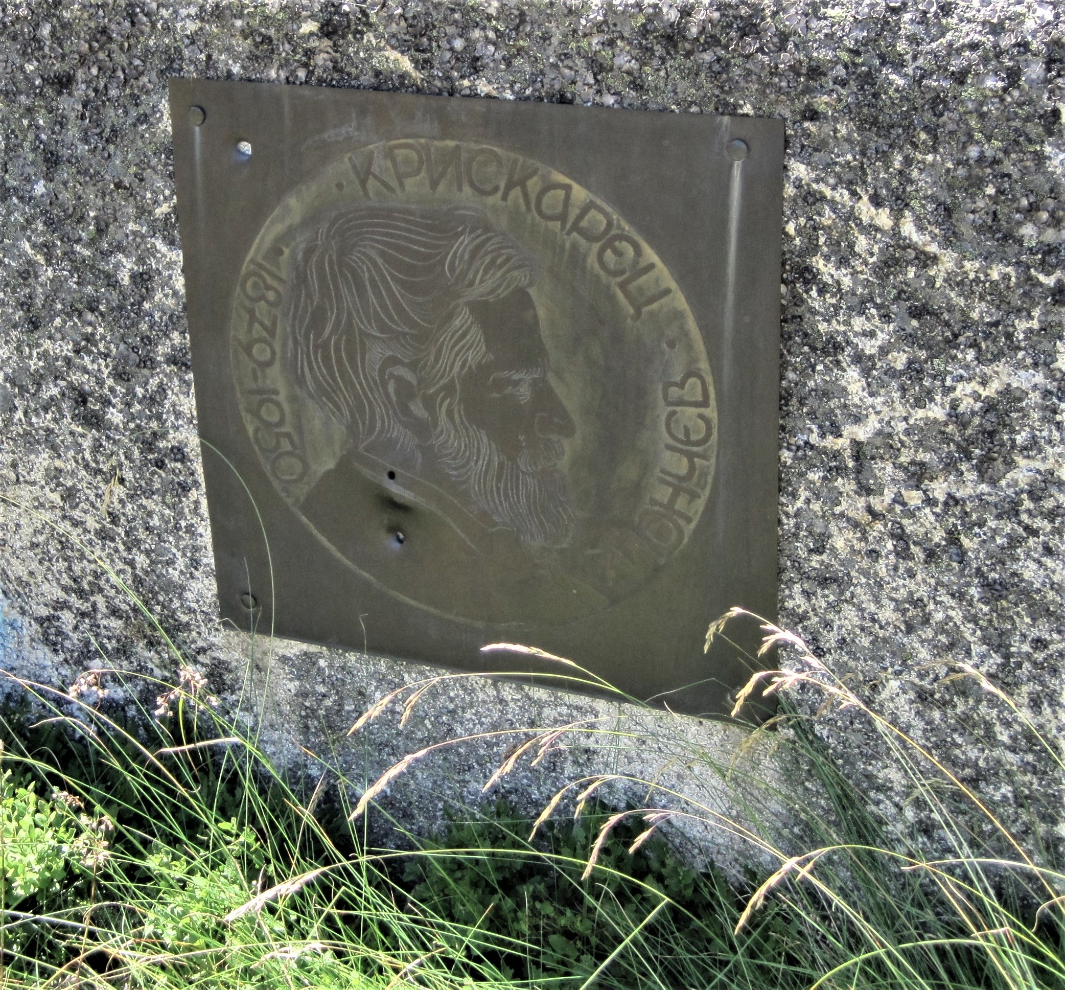 Христо Йончев – Крискарец, паметната плоча на художника край Йончевото езеро, край което е рисувал и което е наименувано на него.